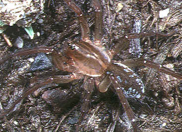 male Pirata subpiraticus from Okinawa.